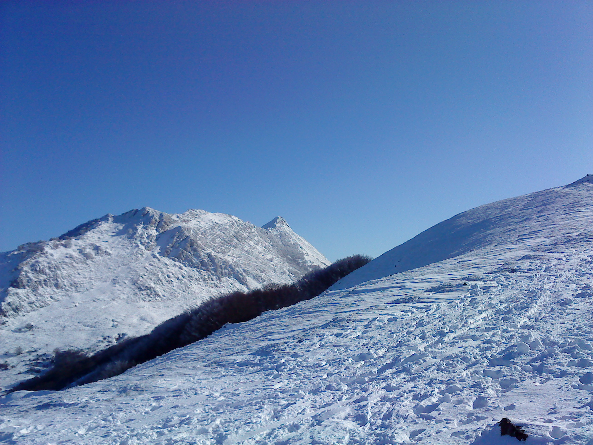 Parque Natural de Urkiola en Bizkaia, País vasco (España). Cordal del Anboto.